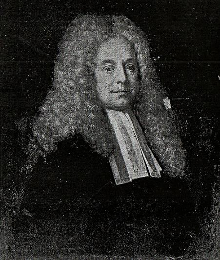 scan personnel de l'article Dr Humbert Mollière, Un précurseur lyonnais des théories microbiennes : J.B. Goiffon et la théorie animée de la peste paru en 1886 dans la revue de l'ACADEMIE DES SCIENCES, BELLES-LETTRES ET ARTS DE LYON